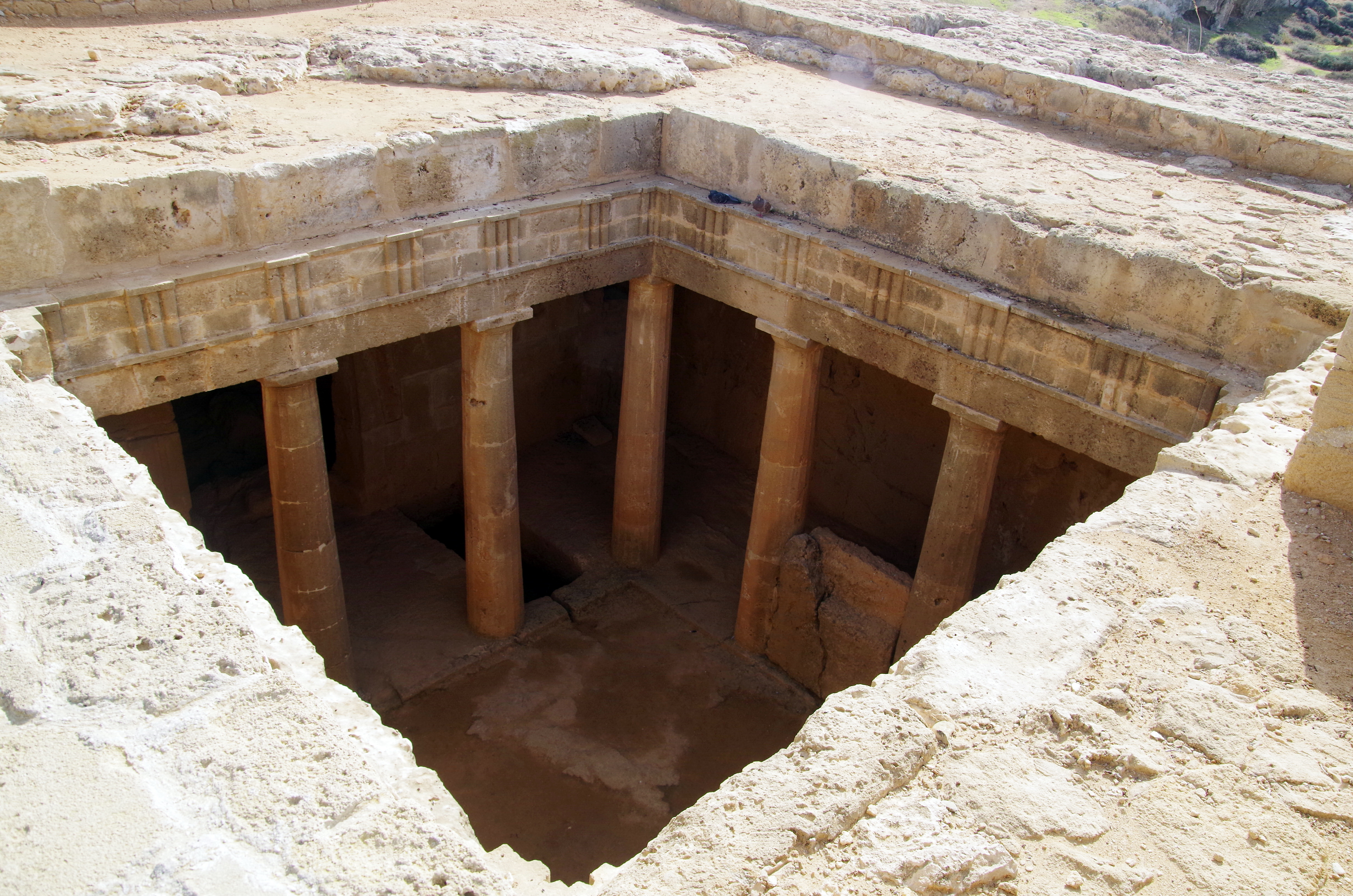 Königsgräber in Paphos